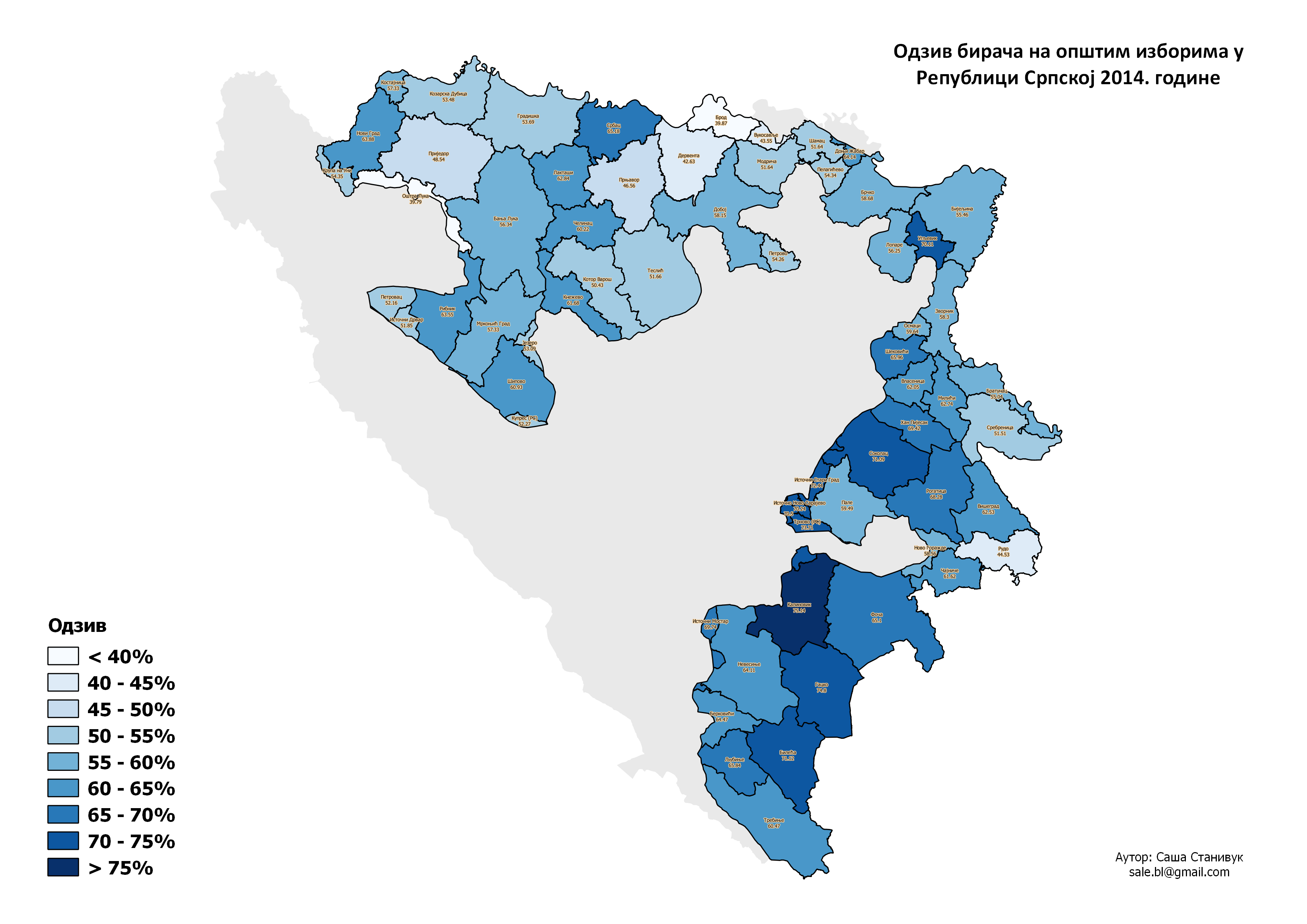 Српски (ћирилица): Одзив бирача на изборе 2014. у Републици Српској